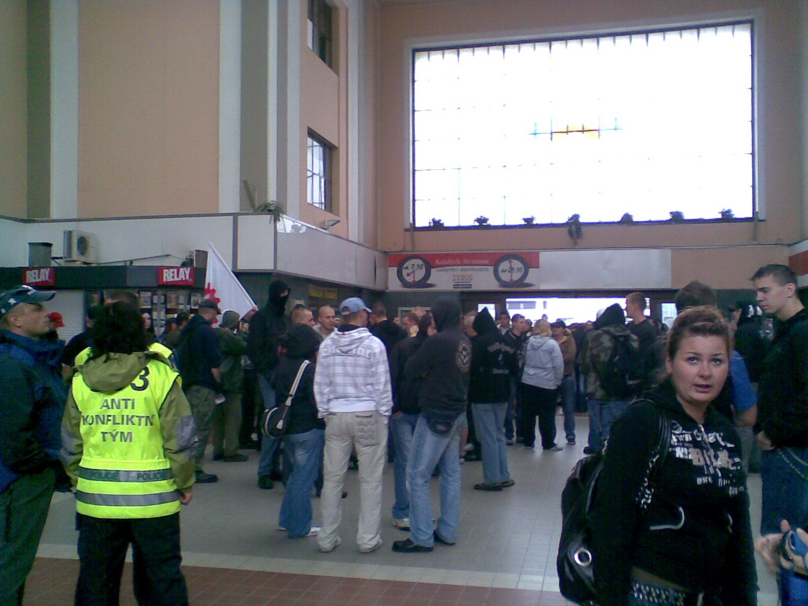 Den Svobody, účastníci při srazu na nádraží v Hradci Králové